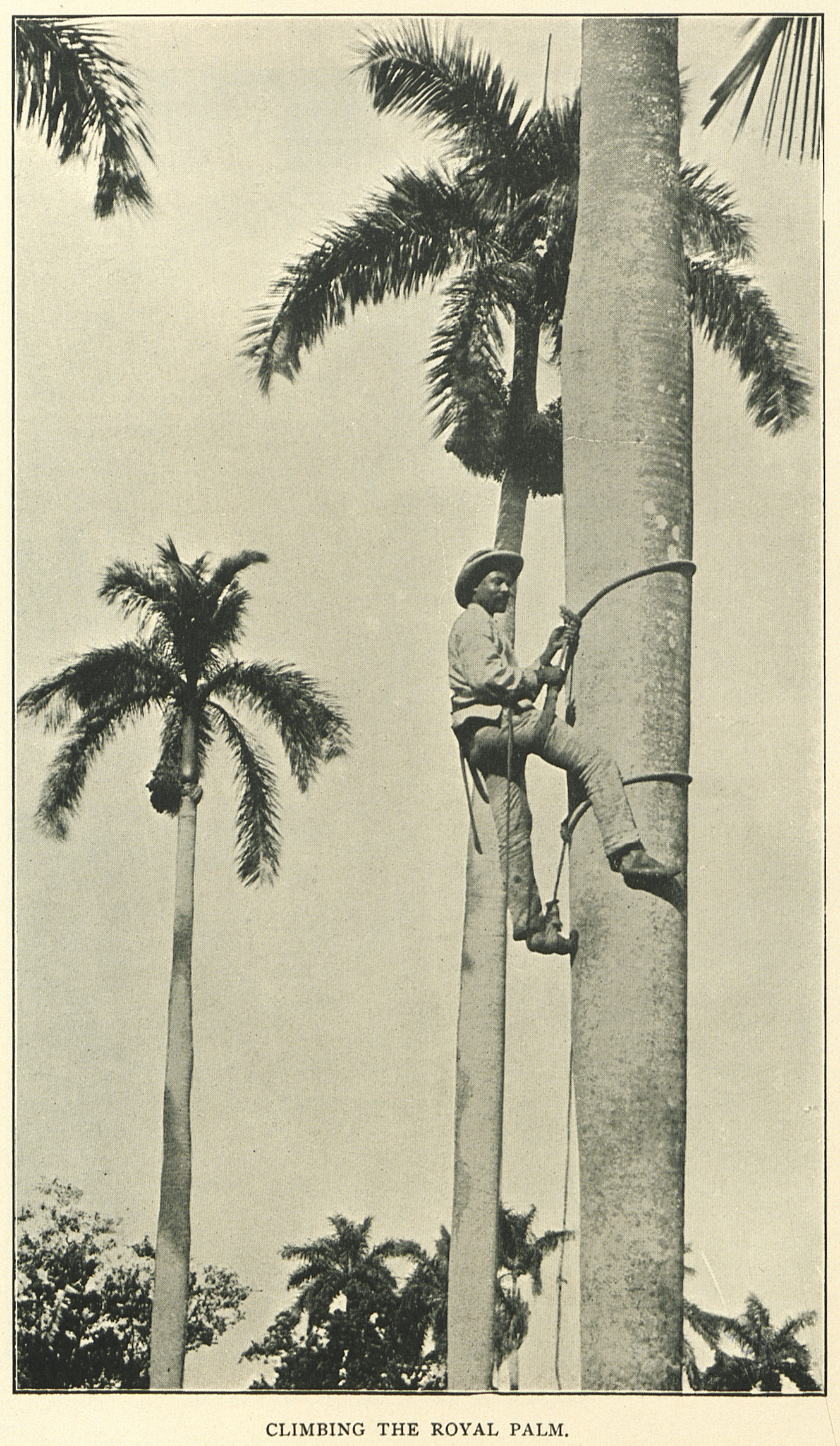 Climbing the royal palm